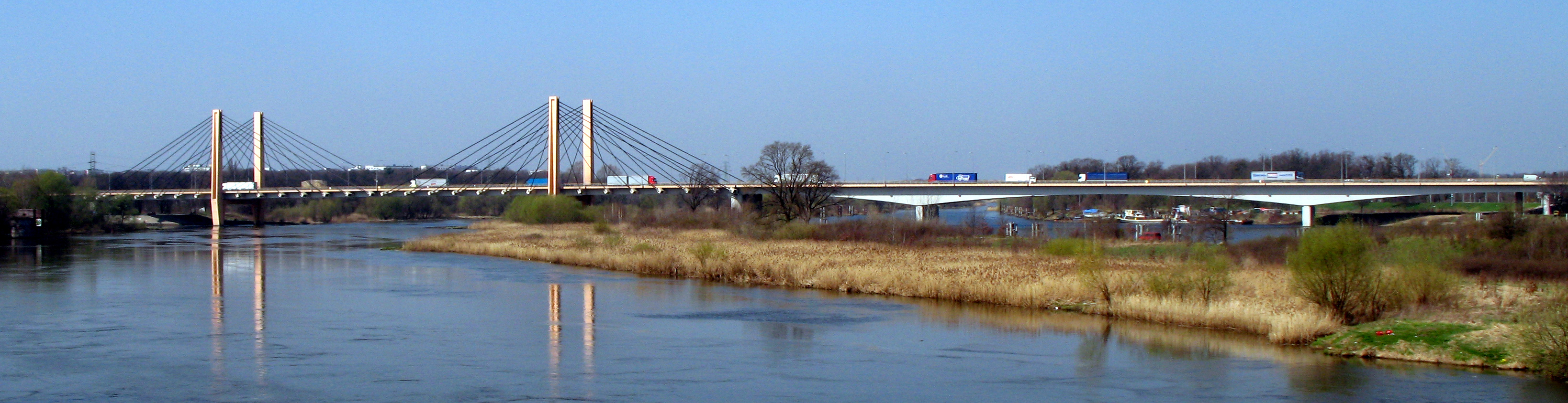 Wrocław, Most Milenijny od wschodu